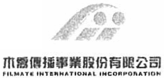 木喬傳播（已解散）商標，商標顏色為綠色，字體顏色為黑色。